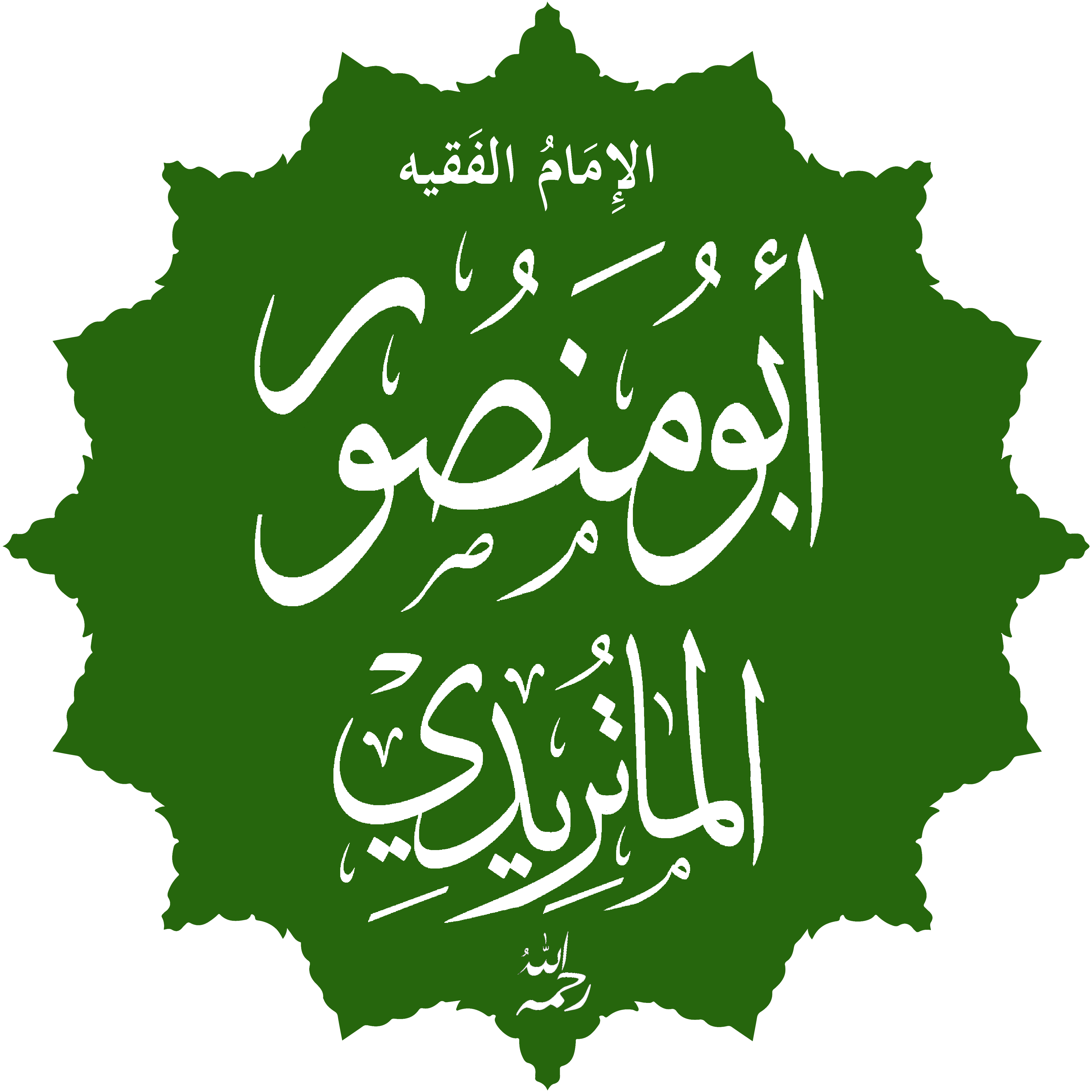 تخطيط لاسم الإمام أبو منصور الماتُردي.